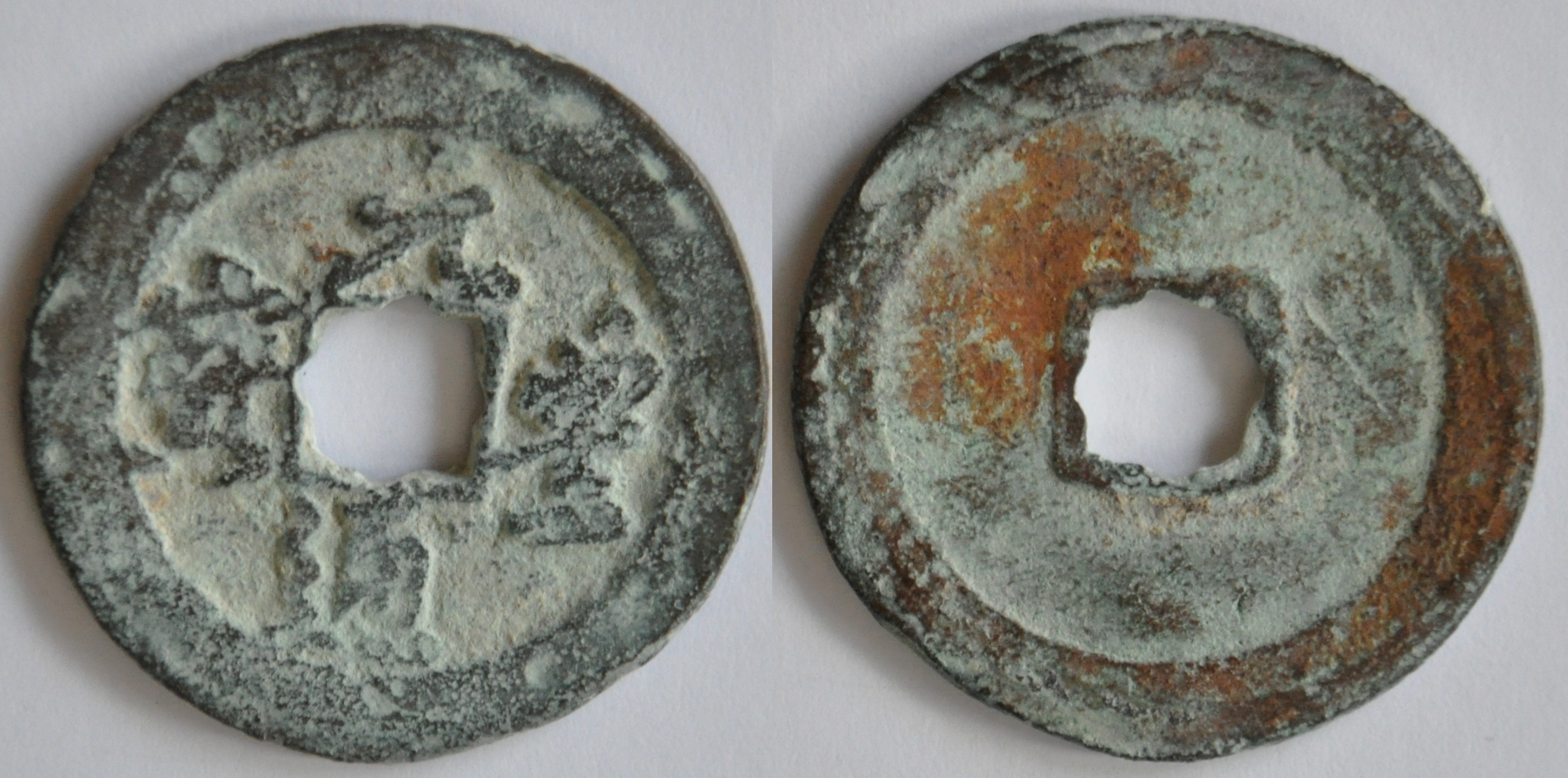 A/ Yuan Feng tong bao R/ vide Une sapèque de valeur 2 de l'empereur Shen Zong (1067-1085) de la dynastie des Song du Nord (960-1127), ère Yuan Feng (1078-1085) en écriture cursive et lecture en cercle. Dimension : 29,5 mm Poids : 6,8 g. Épaisseur : 1,74 mm Référence : H16.249 Chine monnaie Song du Nord Monnaies de la dynastie des Song du Nord (960-1127)